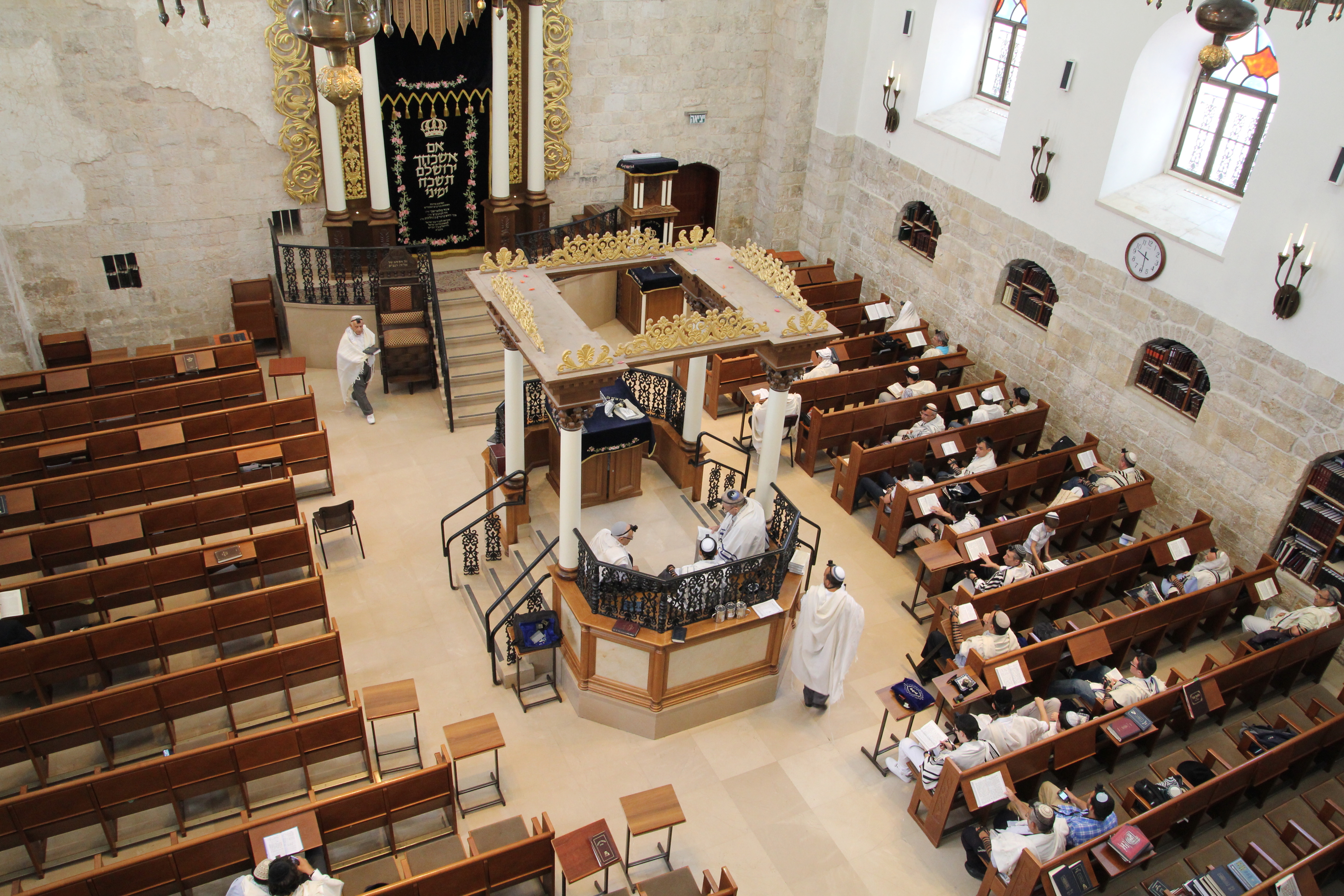 בית הכנסת החורבה או חורבת רבי יהודה החסיד הוא בית כנסת במרכז הרובע היהודי בעיר העתיקה. הוא נבנה לראשונה ב-1700 על ידי חבורת רבי יהודה החסיד ונחרב פעמיים עד שנבנה בשלישית ב-2010.